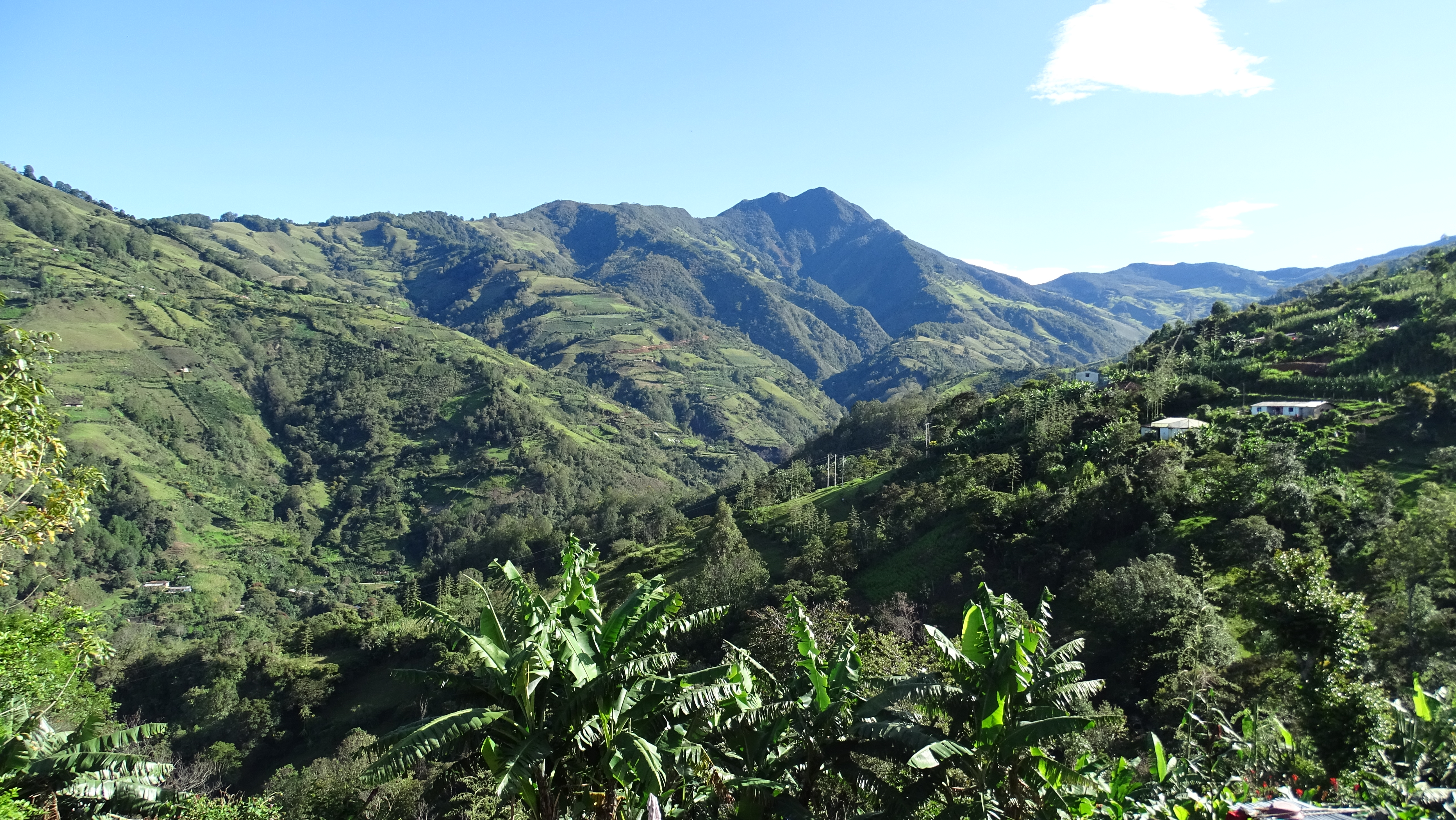 Fotografías tomada desde la vereda los Robles en San Pablo Nariño